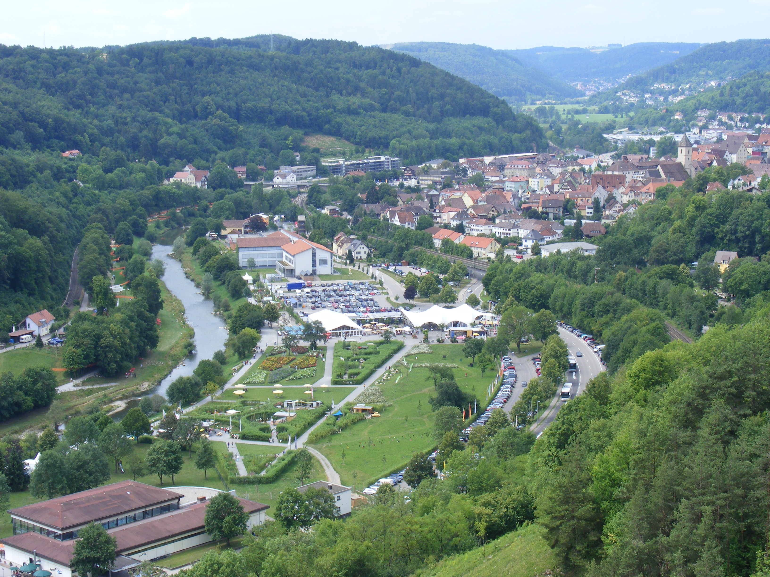 Grünprojekt "Neckarblühen" des Landes Baden-Württemberg in Horb am Neckar